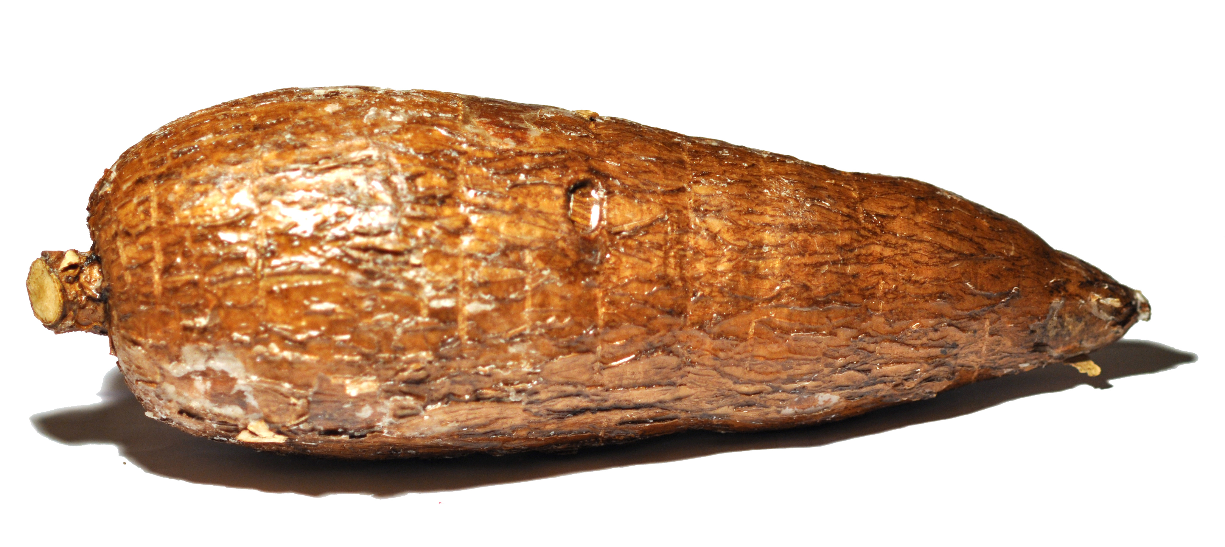 A manioc tuber. Manihot esculenta, also called yuca or casava.